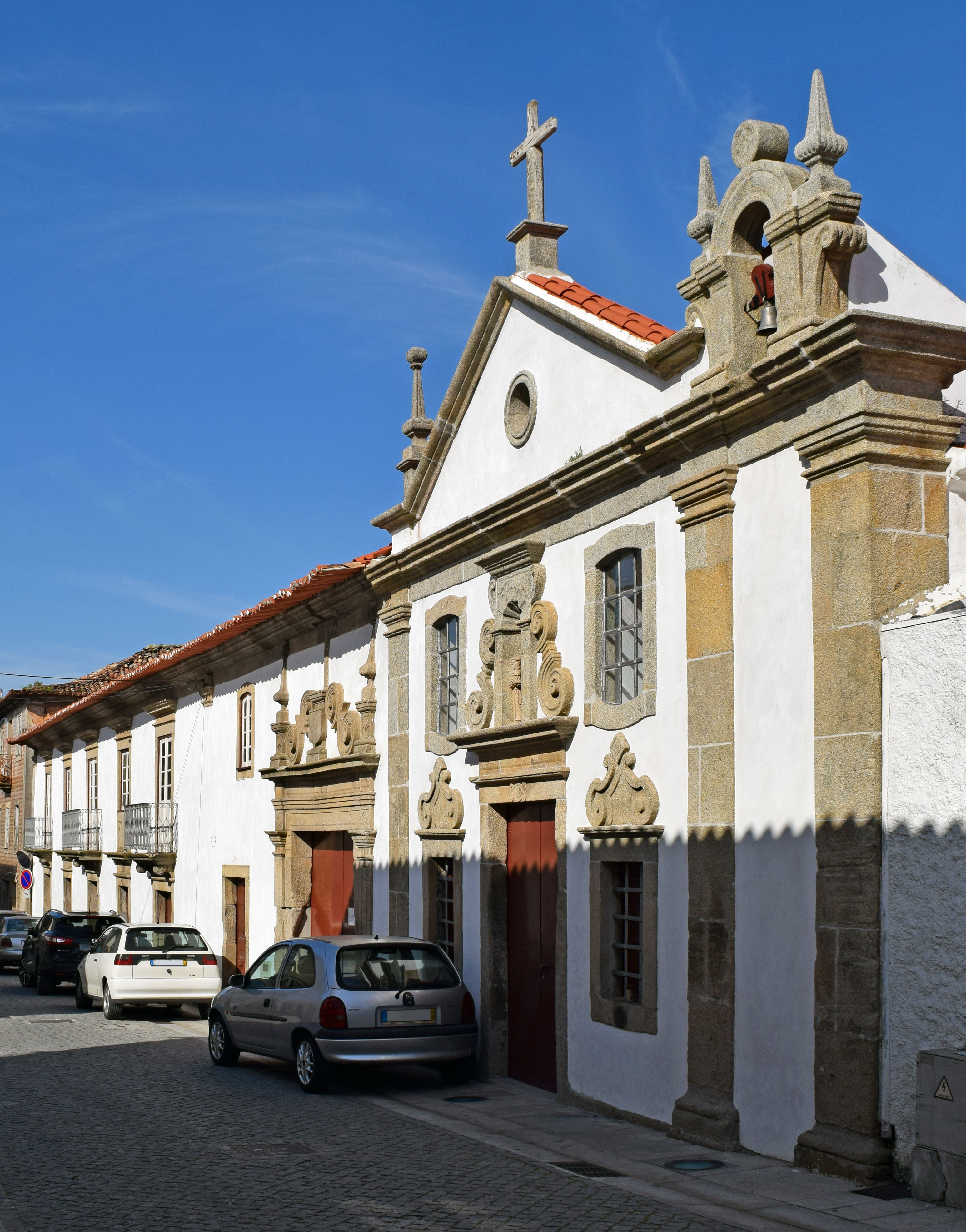 A Casa de Santo António, imóvel de interesse público construido no Sec. XVIII, localiza-se na Rua de Santo António, freguesia e concelho de Albergaria-a-Velha.